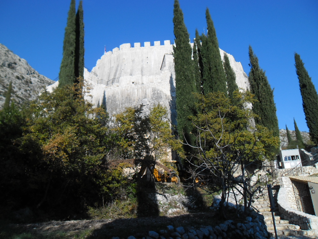 srednjovjekovna utvrda Sokol-grad u Konavlima